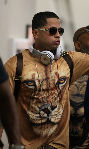 Tempo en el aeropuerto Luis Muñoz Marín. 2013